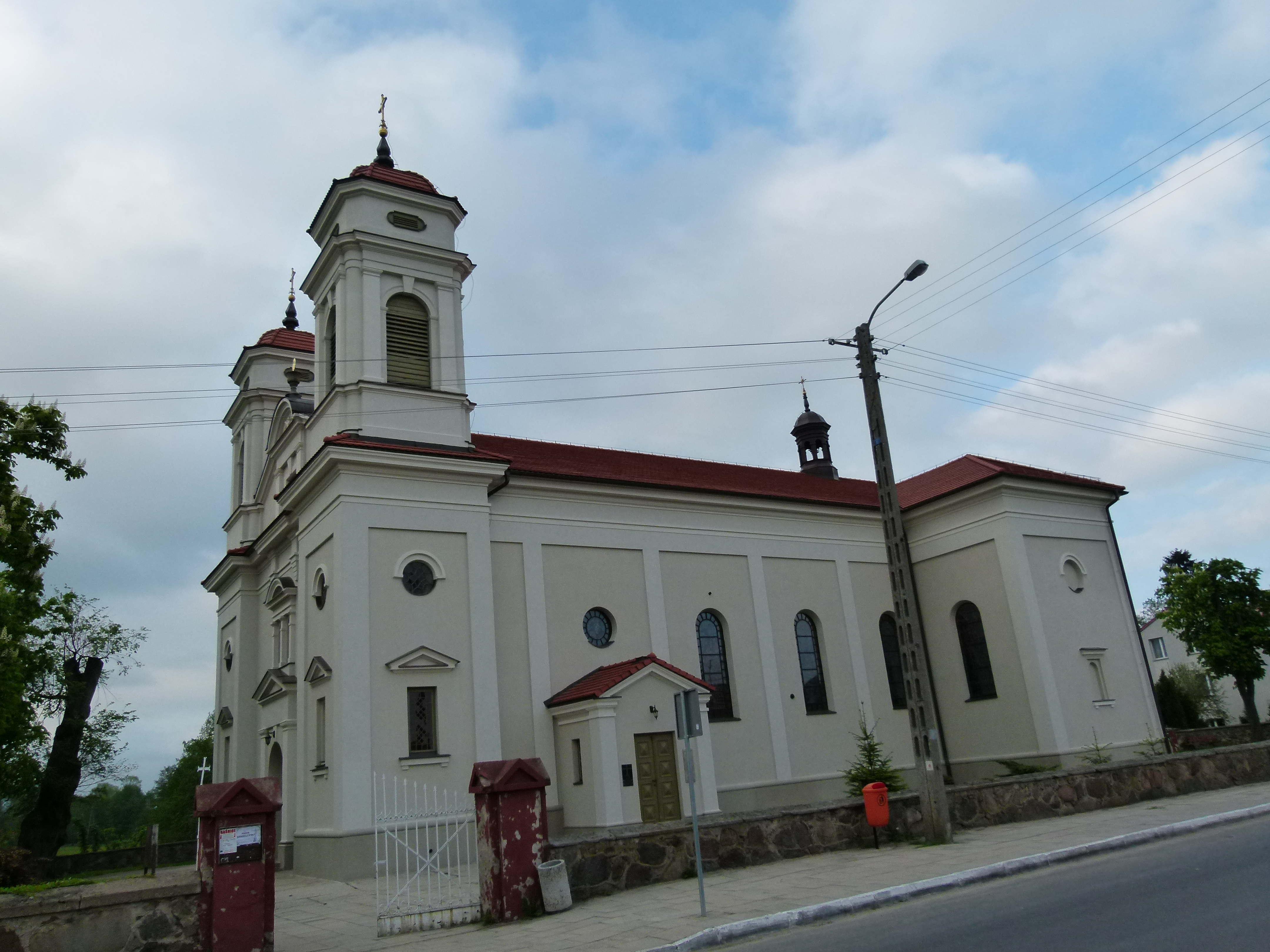 Rzeczyca - zespół kościoła parafialnego pw. św. Katarzyny: - kościół par. pw. św. Katarzyny - cmentarz zabytek nr rejestr. 6